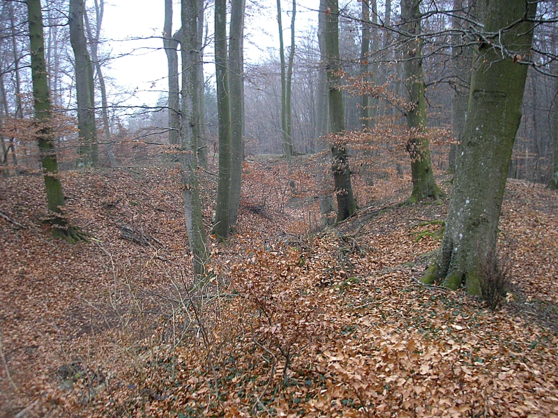 Frühmittelalterlicher Burgstall Purk (Gemeinde Moorenweis, Landkreis Fürstenfeldbruck, Oberbayern). Die Südwestseite der Wallanlagen. Blick nach Süden. Eigene Aufnahme, Jan. 2008 / Early Middle Ages castle Purk near Moorenweis, Upper Bavaria, Germany. South western part of the fortifications, looking south. Own photo, Jan. 2008